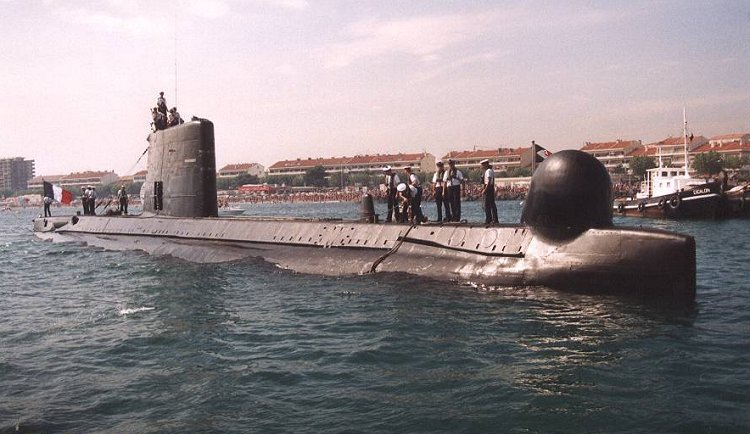 Le sous-marin Doris à Saint-Raphaël, après la revue navale du 14 août 1994. Original caption: “ Photo © Guillaume Rueda”